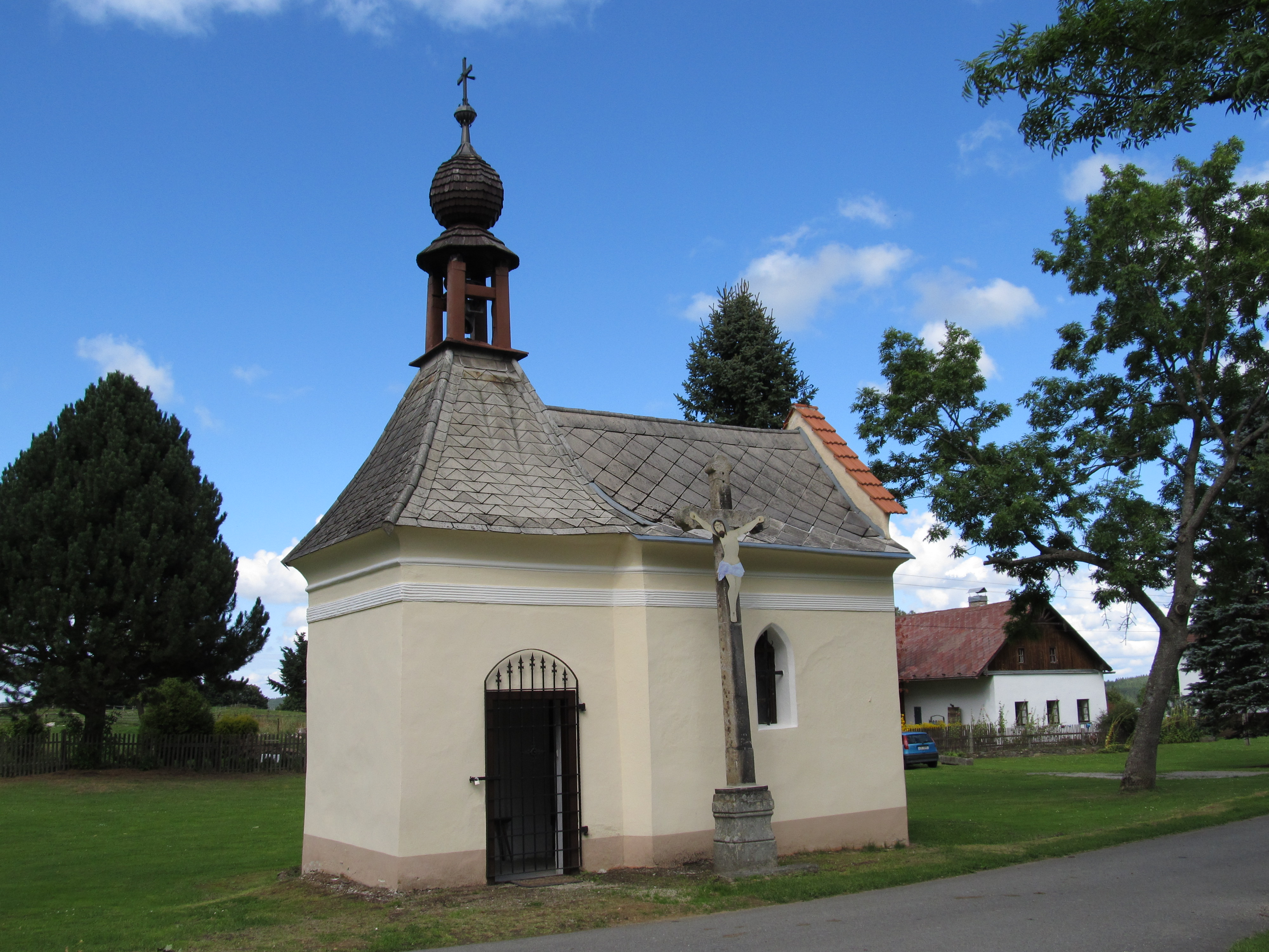 Kaple Panny Marie Karmelské (Včelná pod Boubínem), náves, Včelná pod Boubínem